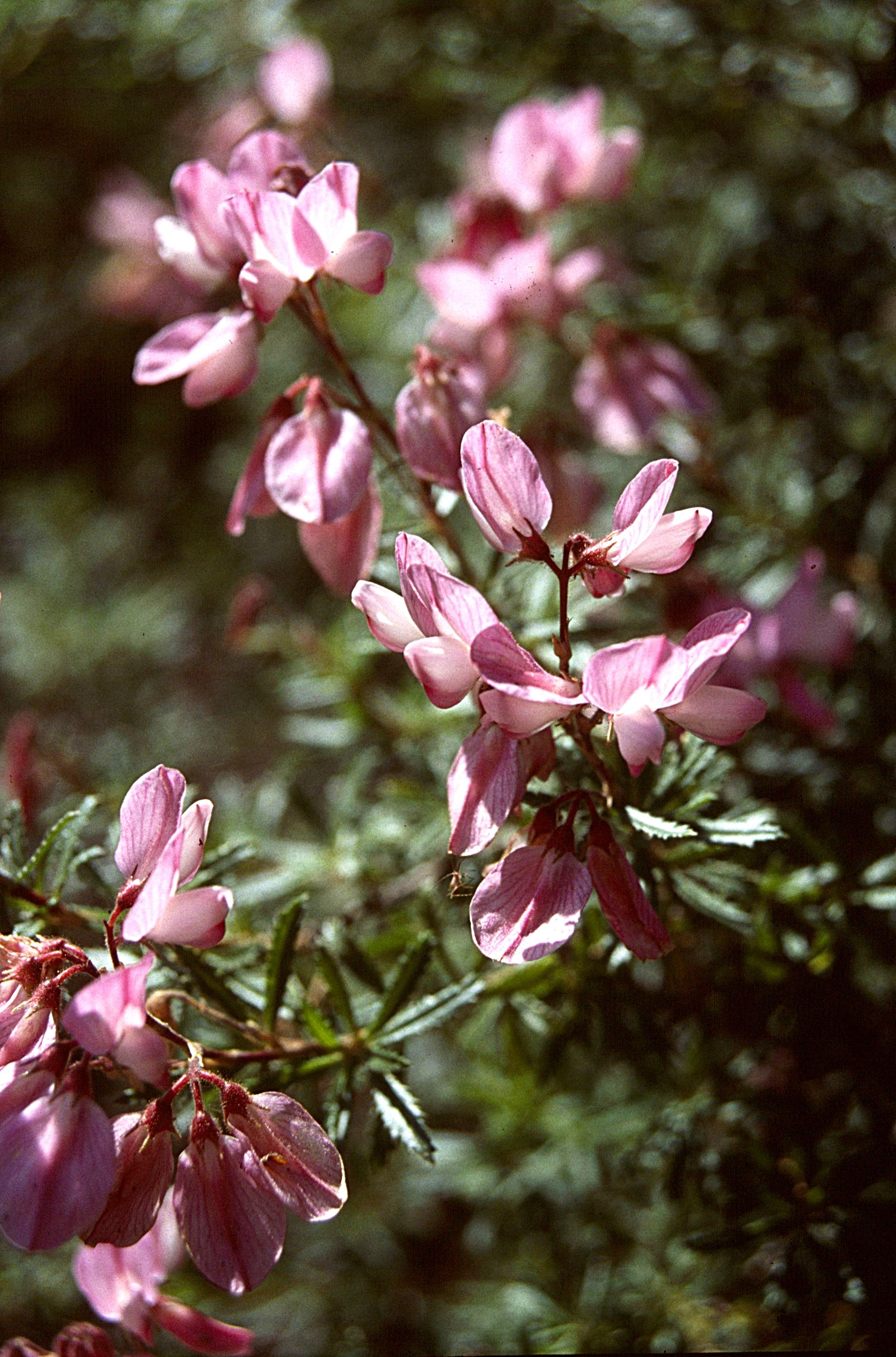 Ononis fruticosa (Seealpen)